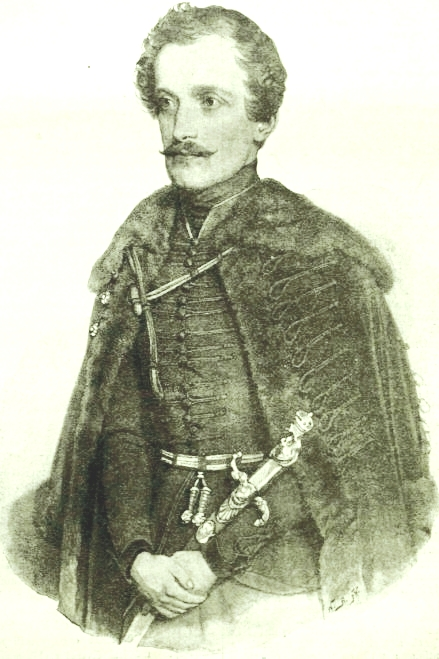 Dessewffy Aurél magyar közíró, jogász, újságíró, az MTA levelező tagja, a Kisfaludy Társaság alapító tagja.